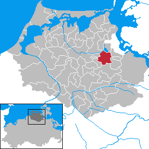 Steinhagen in Mecklenburg-Vorpommern - District Nordvorpommern